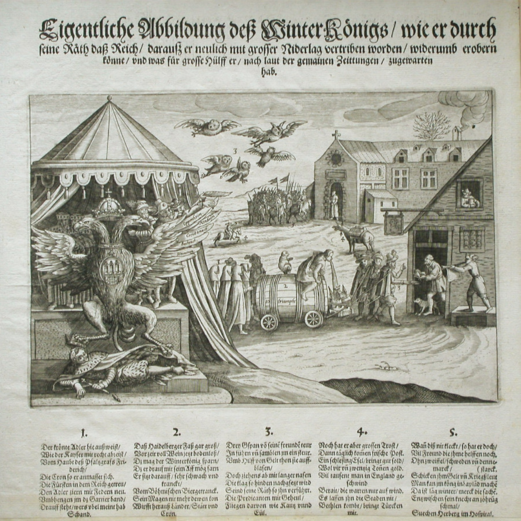 Spottschrift auf den Winterkönig Freidrich V. von der Pfalz